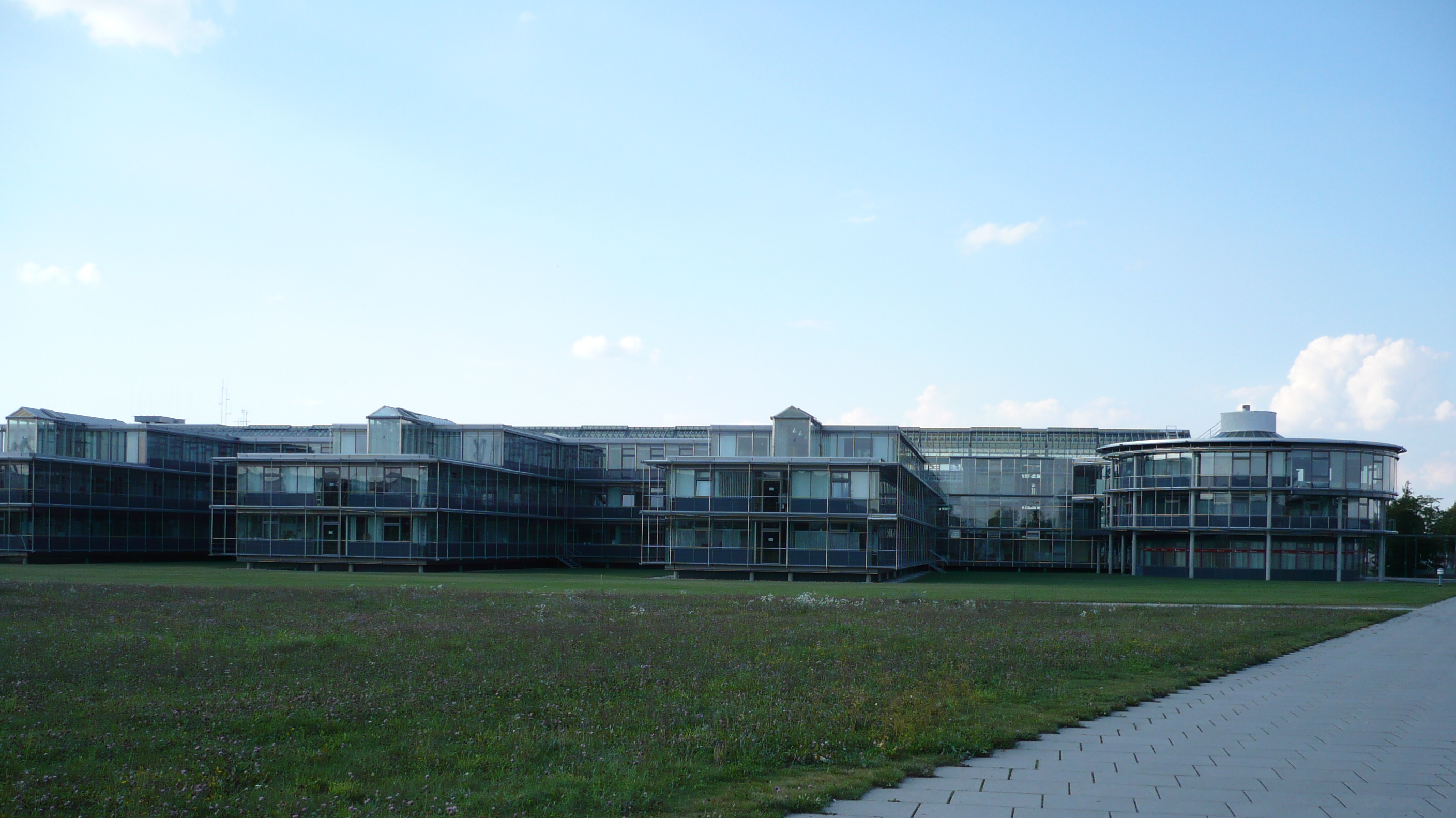 Zentrale der FMG am Flughafen München